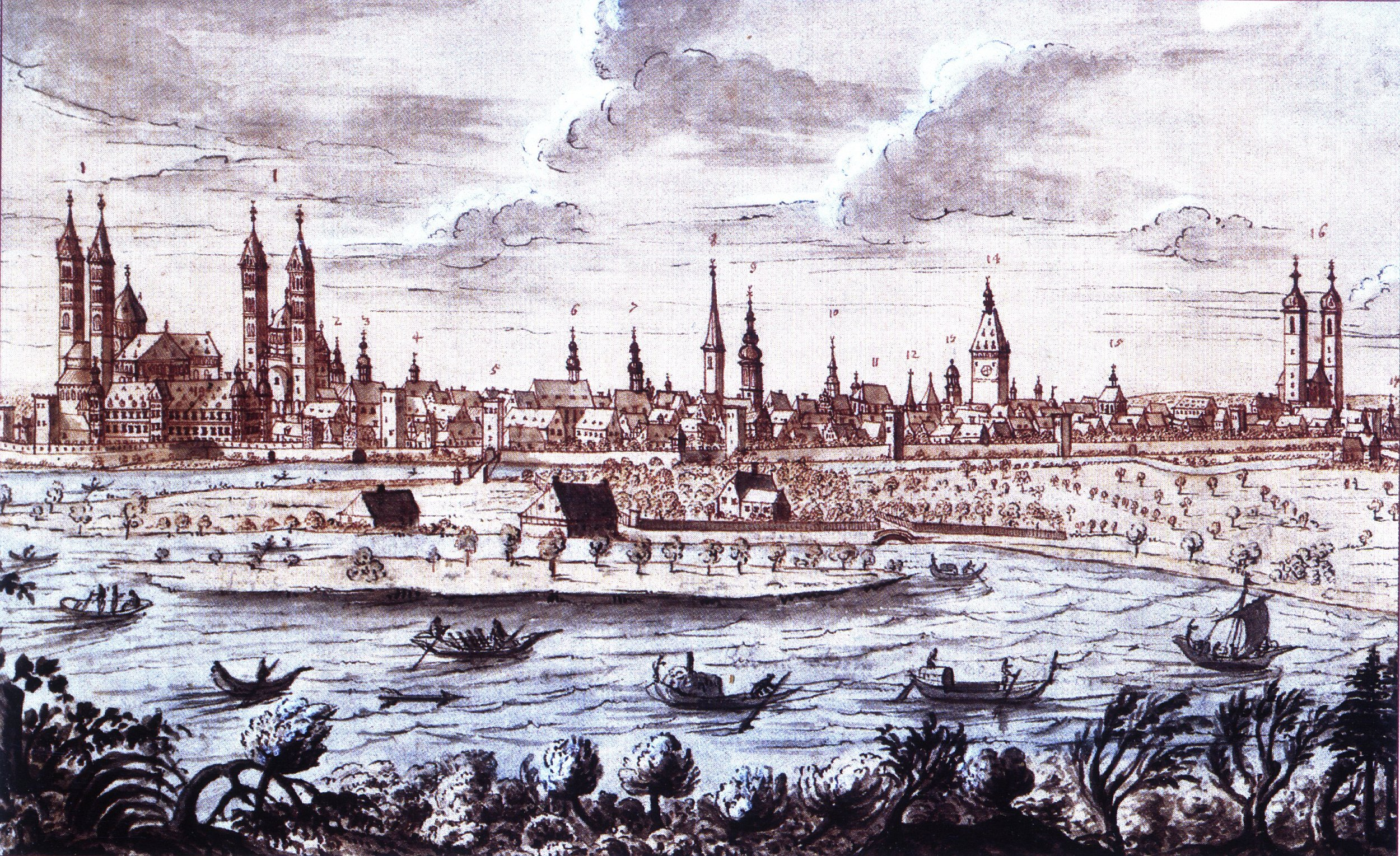 Stadtansicht von Speyer vor 1750, Federzeichnung